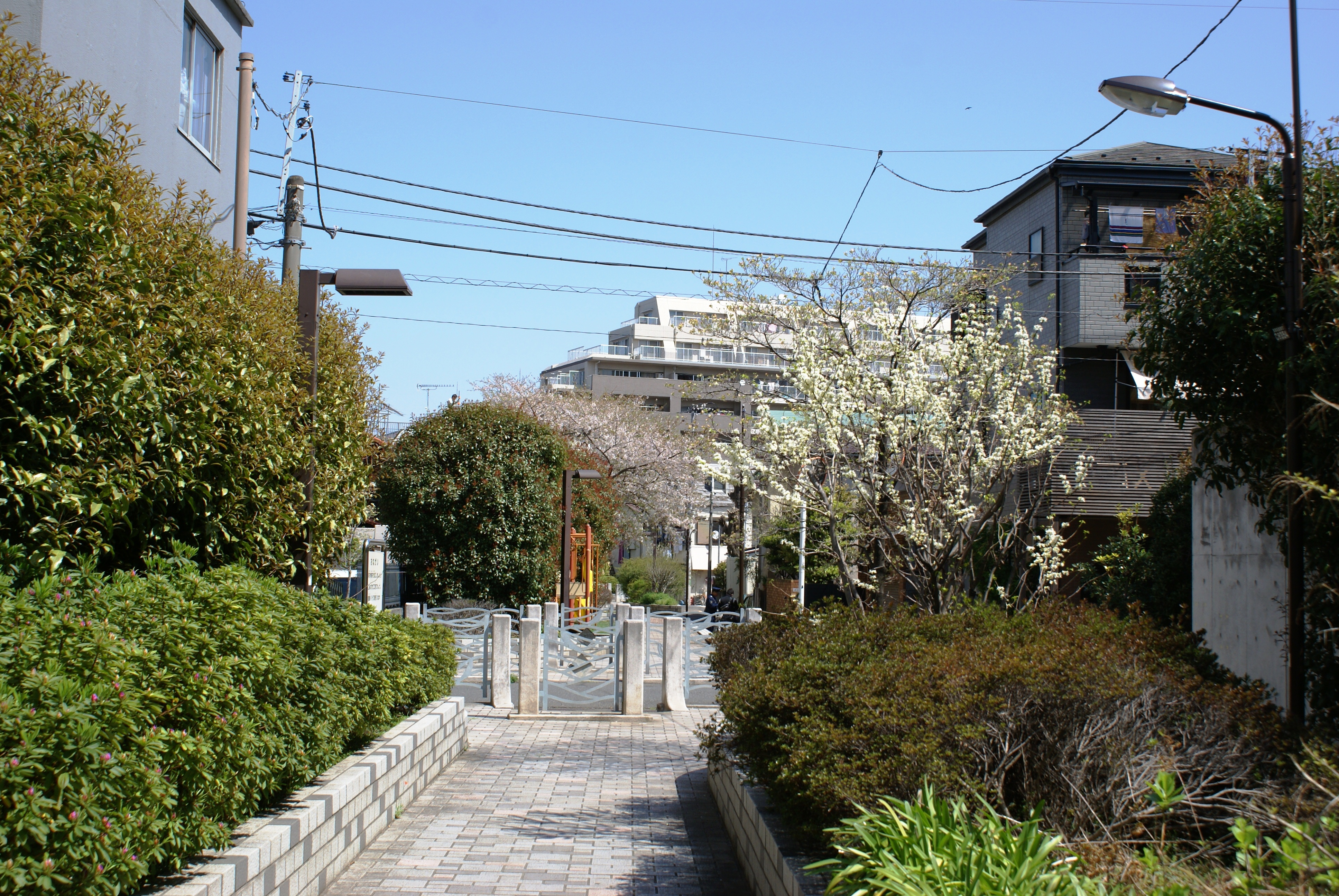 谷端川緑道